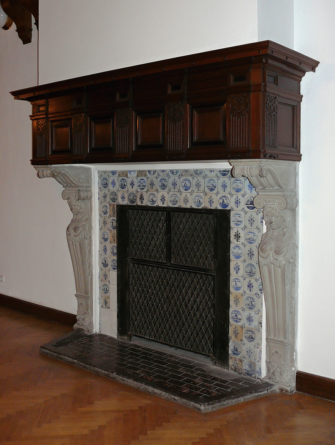 Krb ve schodišťové hale Grabovy vily